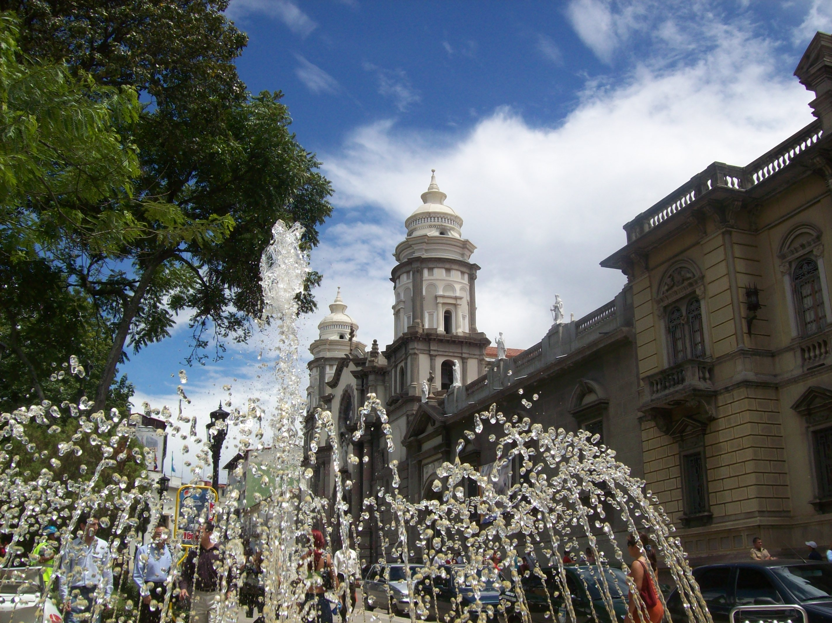 Av. 4 Bolivar, Palacio Arzobispal y Basílica Menor de Mérida